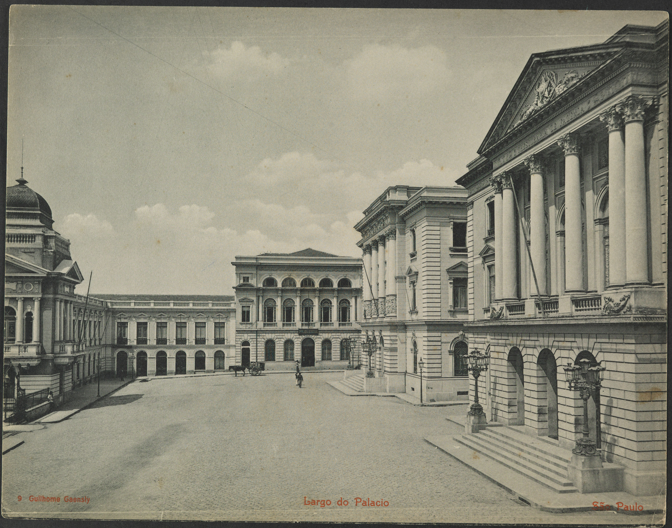 Largo do Palácio. Gaensly, Guilherme, 1843-1928. Lembrança de São Paulo. p. Foto 09